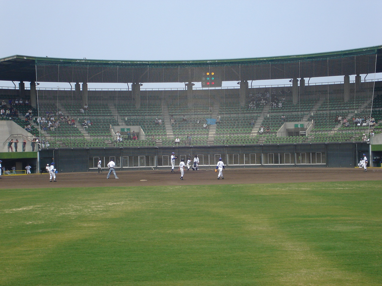 新居浜市営球場。 - 日本国愛媛県新居浜市にある野球場。